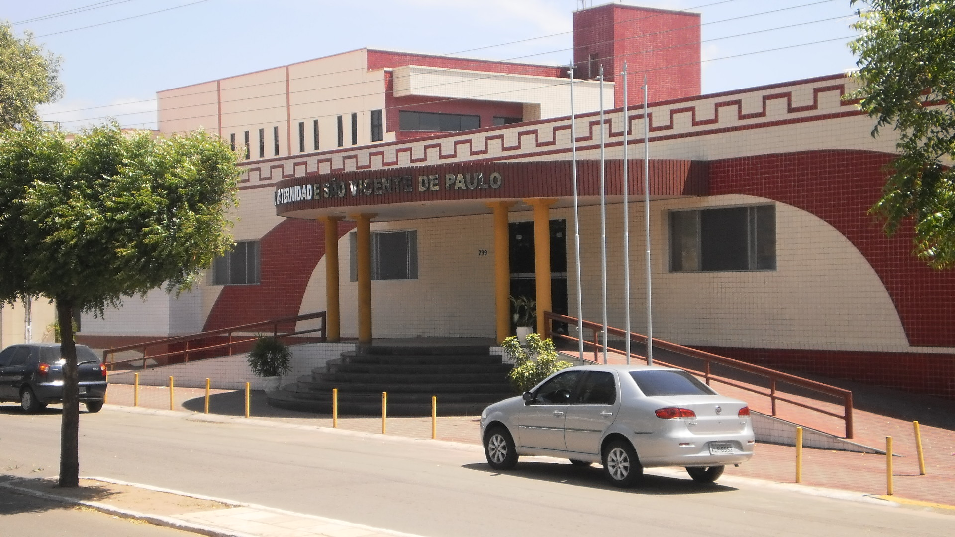 Fachada do Hospital São Vicente de Barbalha.